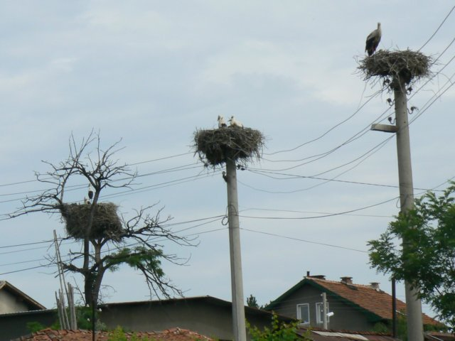 Storks in Benkovski estate, Sofia, Bulgaria.